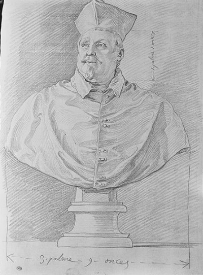 Busto di Scipione Borghese (Bernini), disegno, 26,0 x 19,0 cm, Paris, Louvre